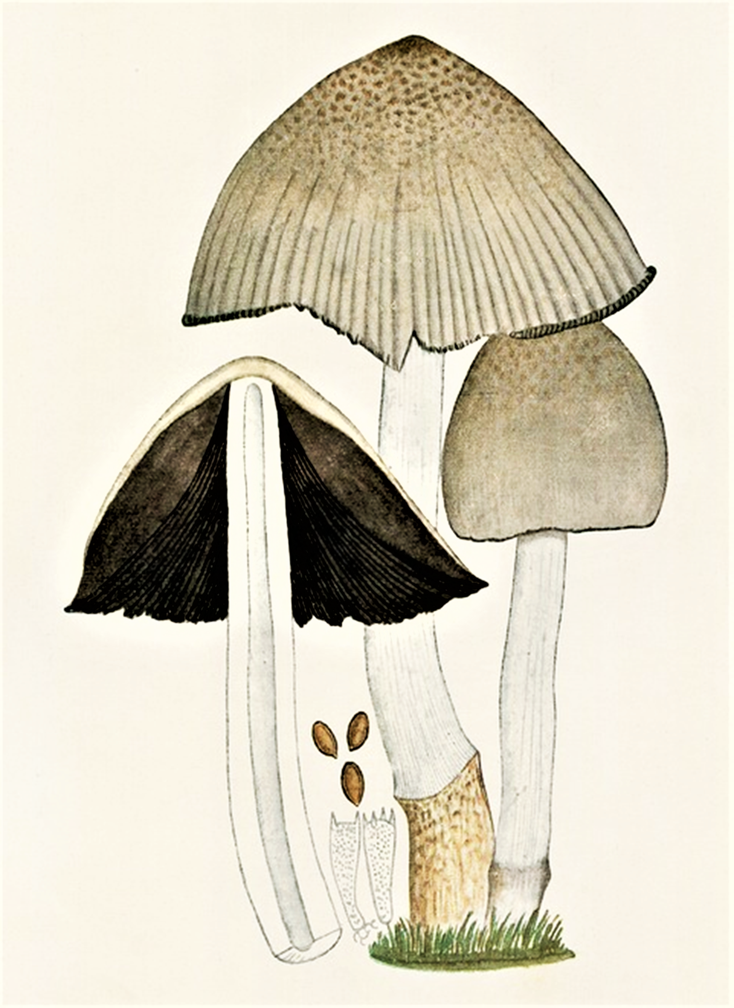 Giacomo Bresadola: Coprinus atramentarius (Bull., 1786) Fr. (1838), heute Coprinopsis atramentaria (Bull.) Redhead, Vilgalys & Moncalvo (2001)